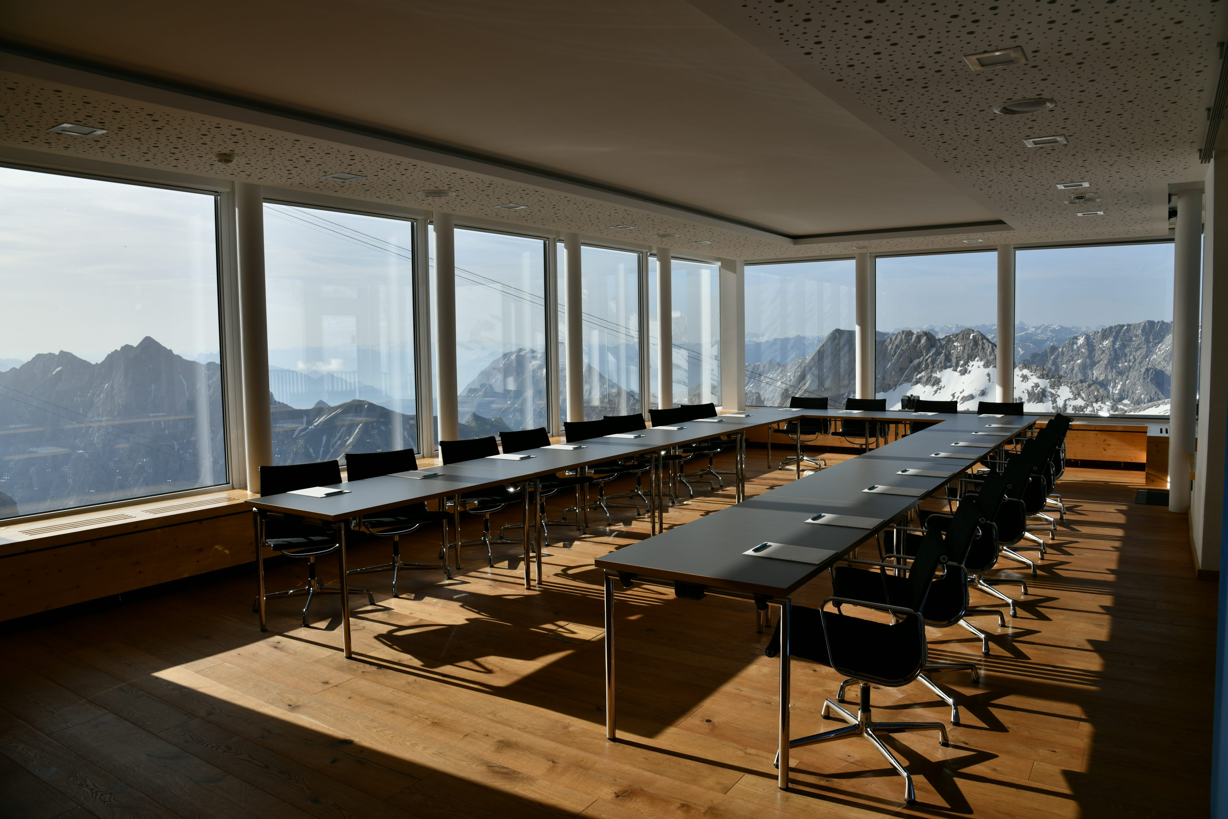 Tagungsraum 'Gletscherstube' der Umweltforschungsstation Schneefernerhaus. Copyright: M.Neumann_UFS GmbH